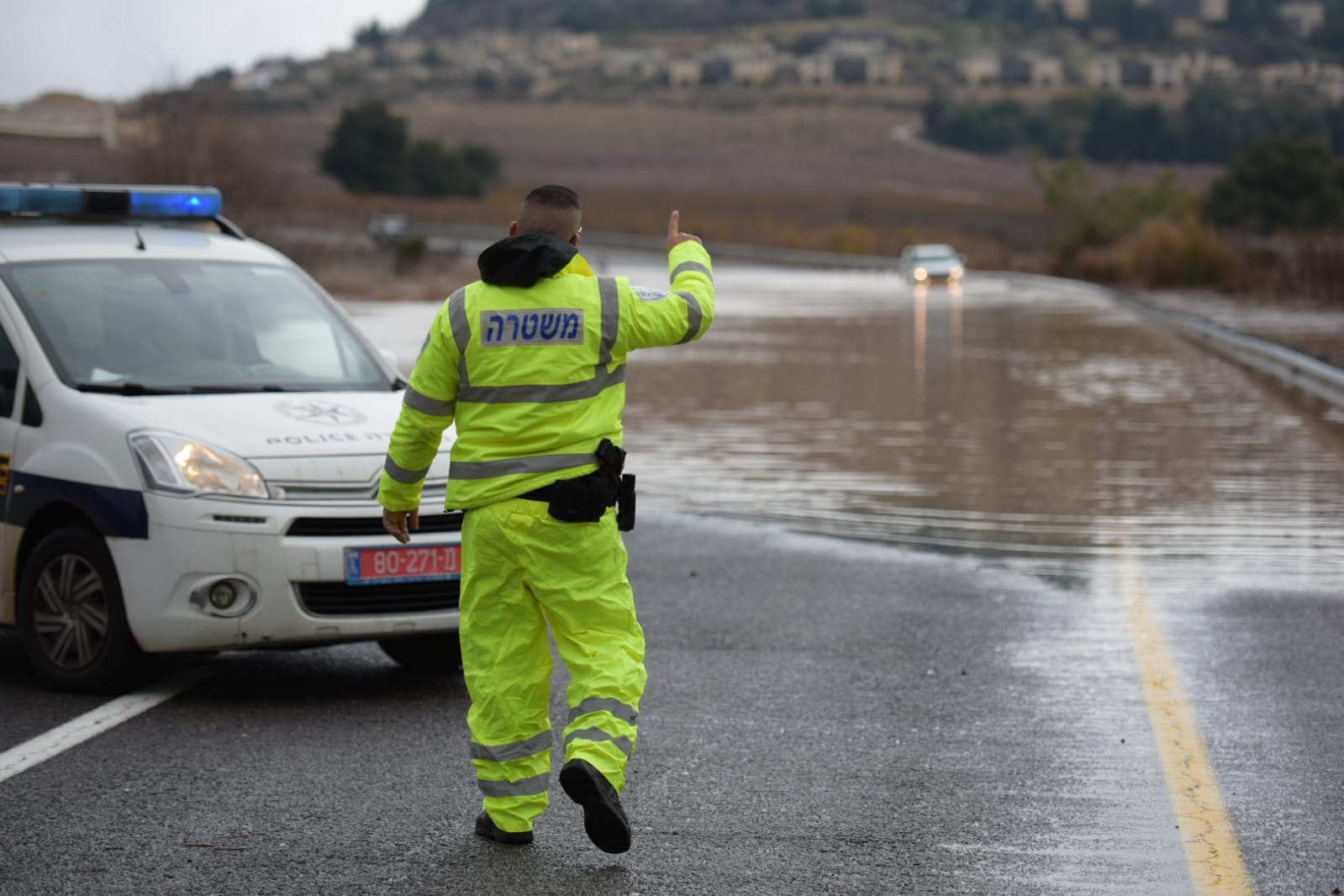 השוטרים שלנו פועלים בשטח תחת גשם שוטף ומזג אוויר סוער, מחלצים אזרחים שנקלעו להצפות, מכוונים את התנועה בכבישים ונכונים להגיב לכל קריאה.